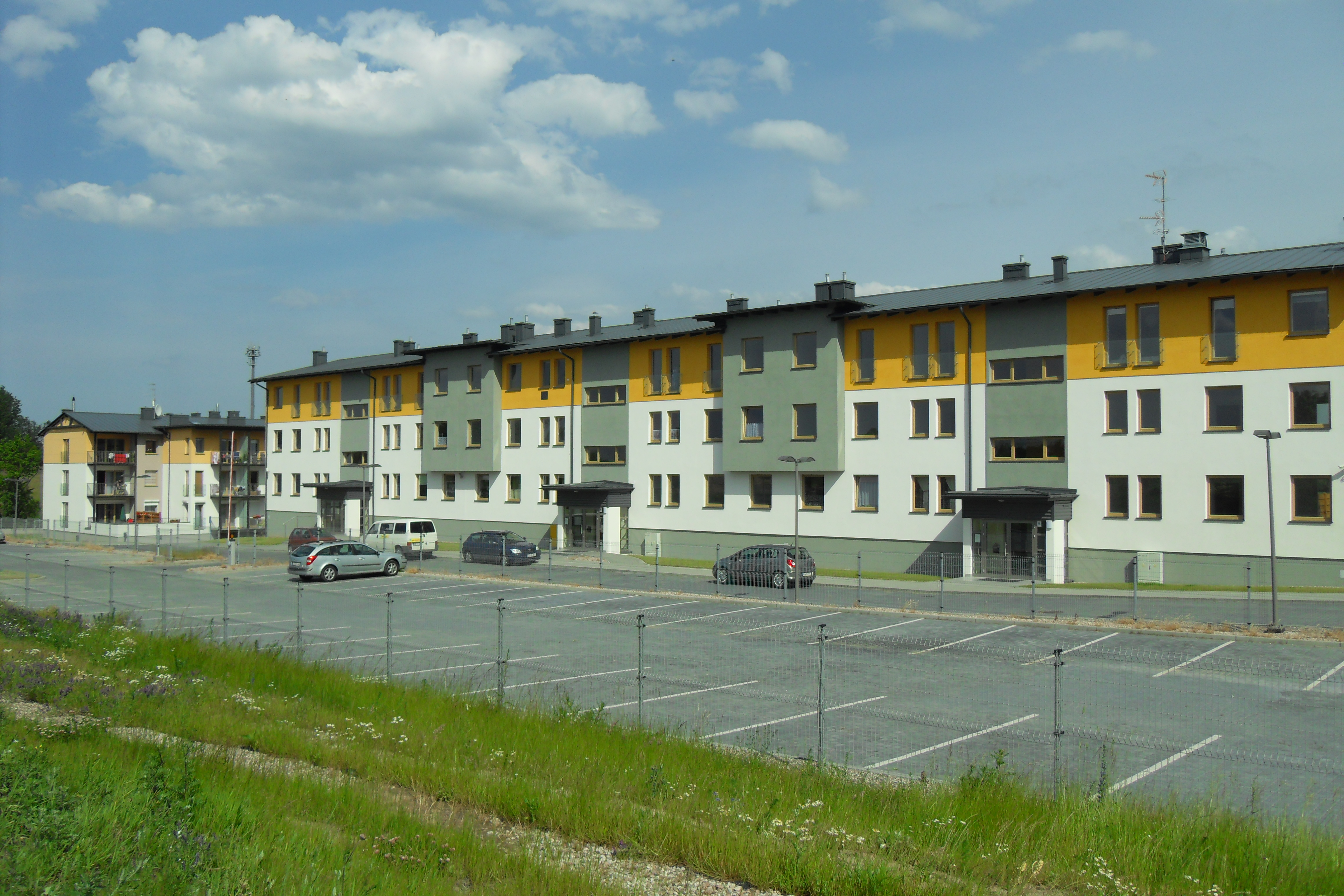 Gdańsk Maćkowy, dzielnica Chełm. Osiedle Kazimierz, ul. Starogardzka.